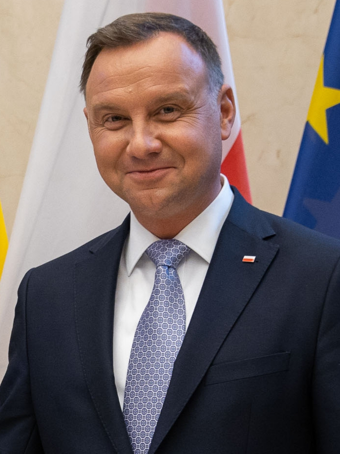 Prezydent Andrzej Duda podczas spotkania z Prezydentem Ukrainy Wołodymyrem Zełenskim